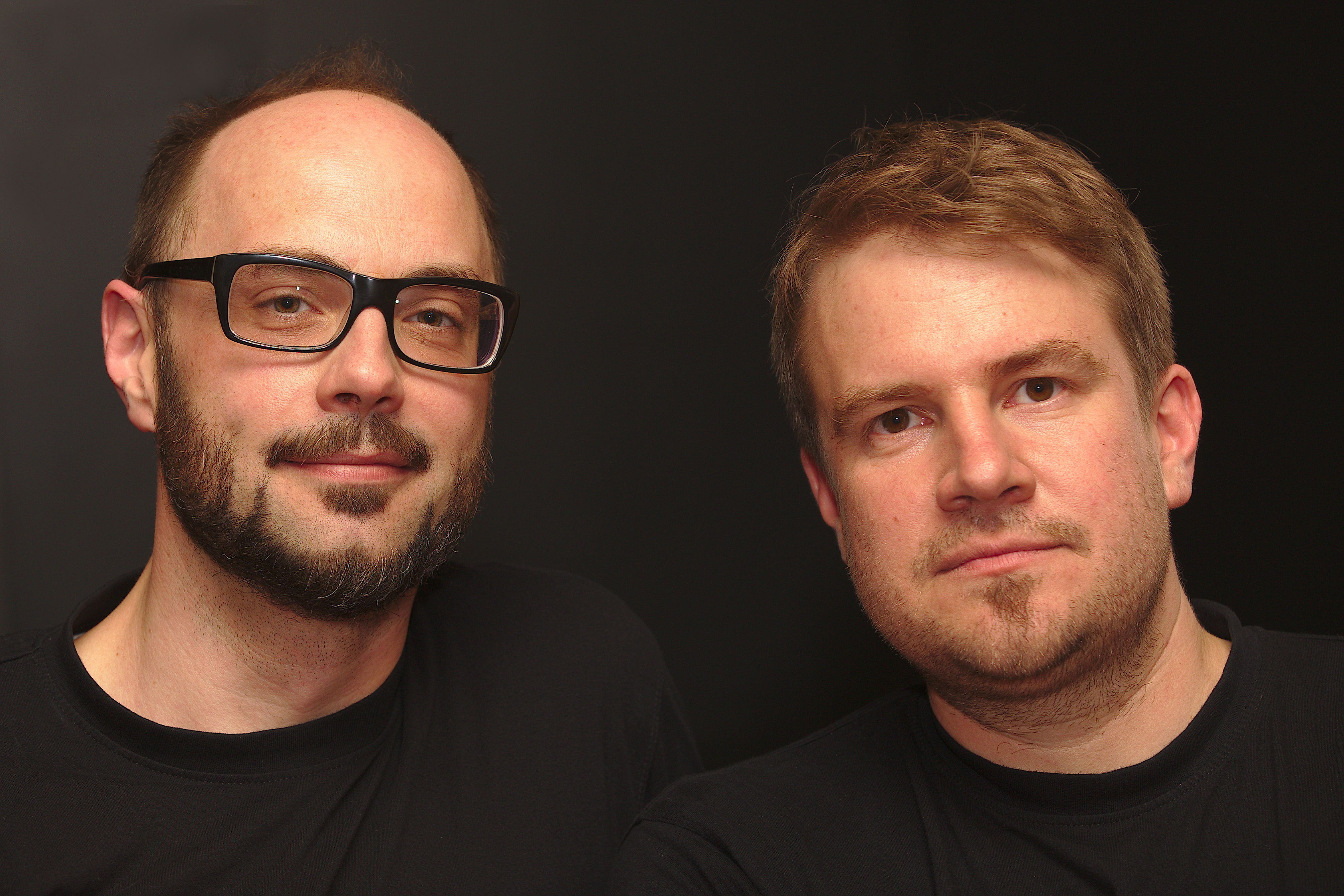 Volker Klüpfl und Michael Kobr nach einer Lesung in Salzburg